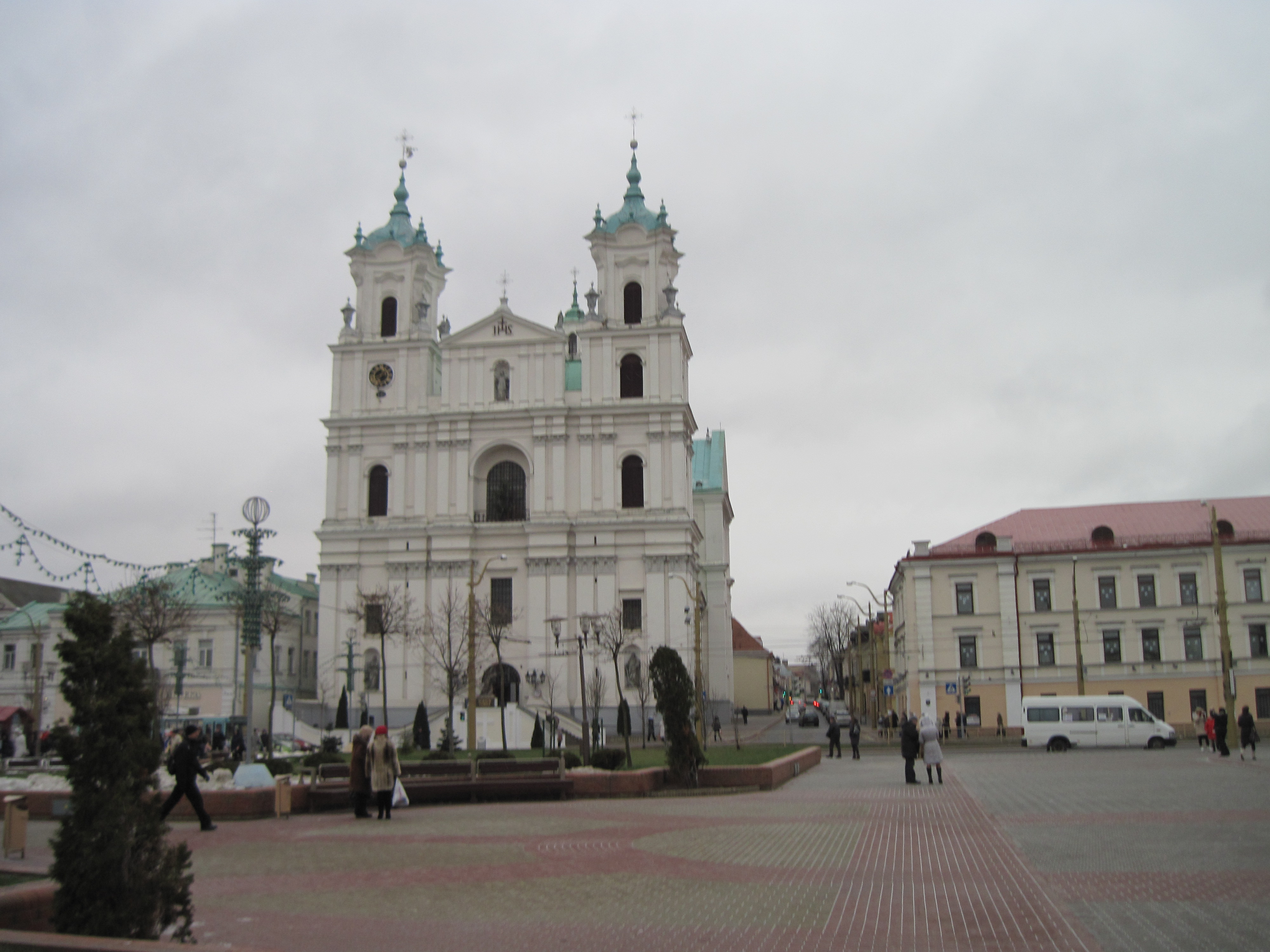 Беларуская (тарашкевіца): Забудова гістарычнага цэнтра Гродна. Вуліца К. Маркса, 2. Касцёл езуітаў. Выгляд з Савецкай плошчы